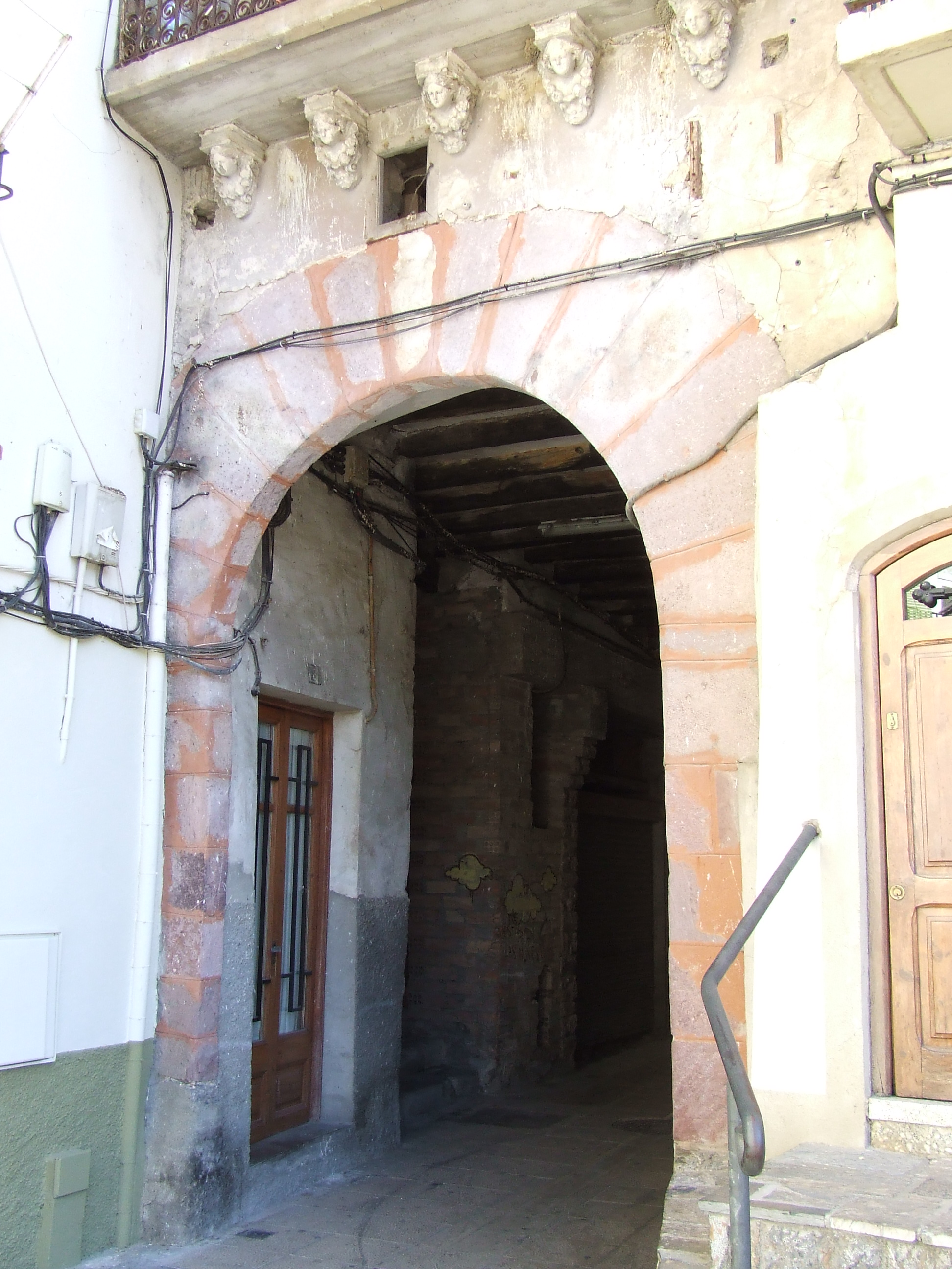 Portal de migdia de Sort (Pallars Sobirà)